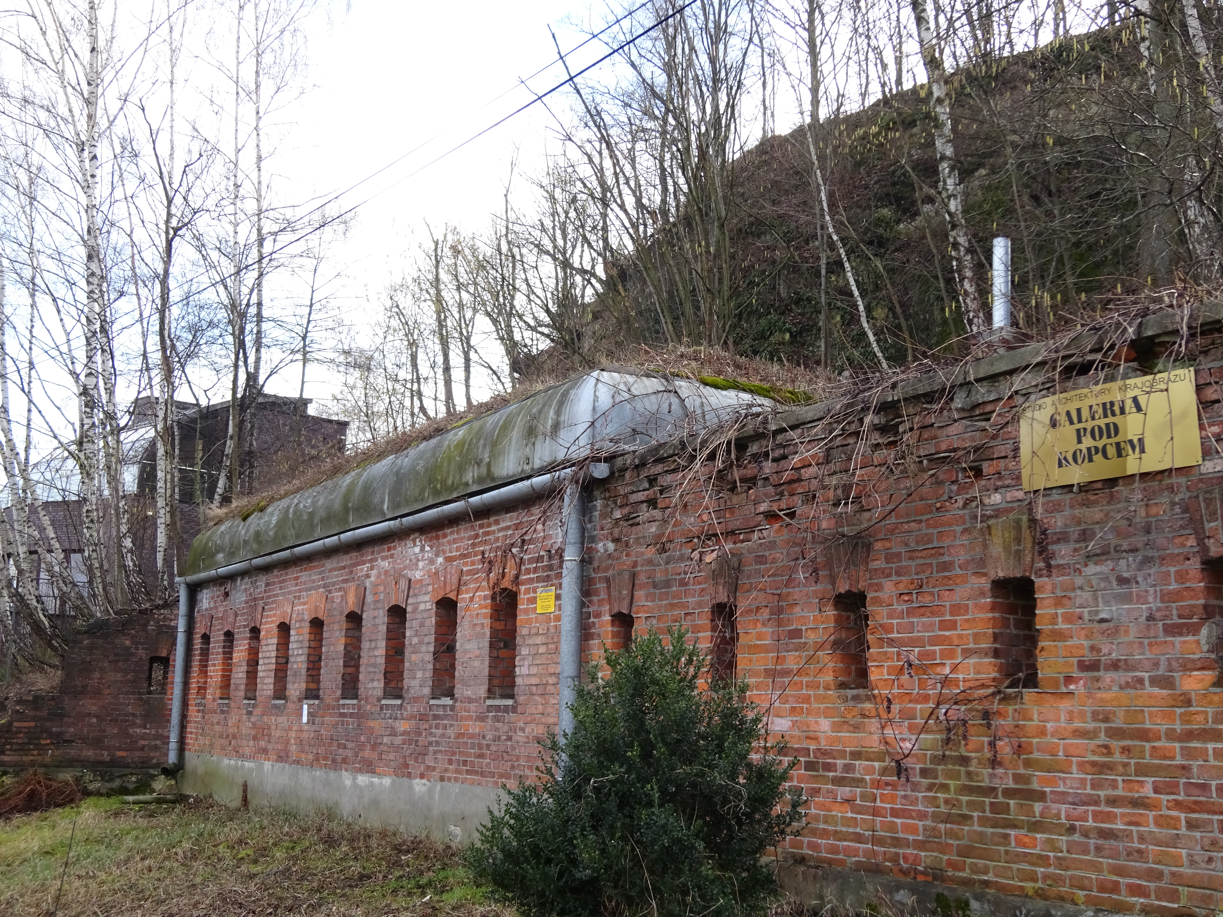 Ostróg Bramny 3B Fortu Cytadelowego 2 "Kosciuszko" w Krakowie, przy ul. Hofmana. 2016